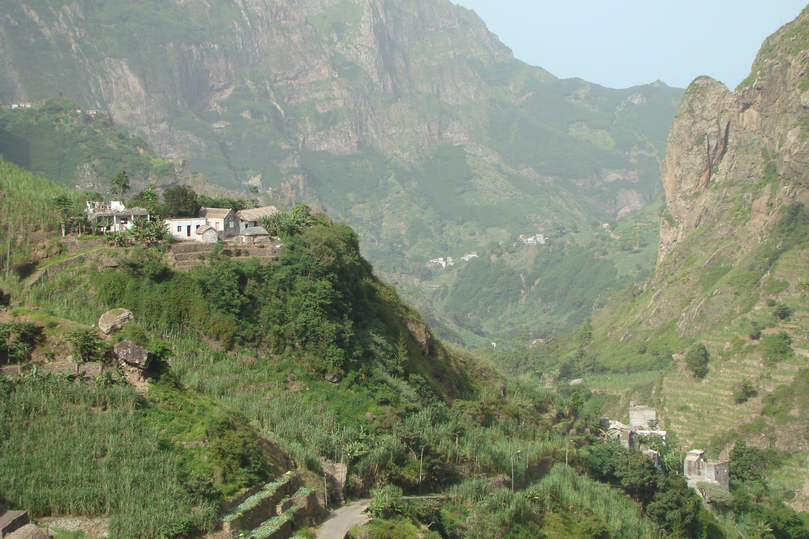 Vista del Valle de Paul (Santo Antao) desde Cabo da Ribeira